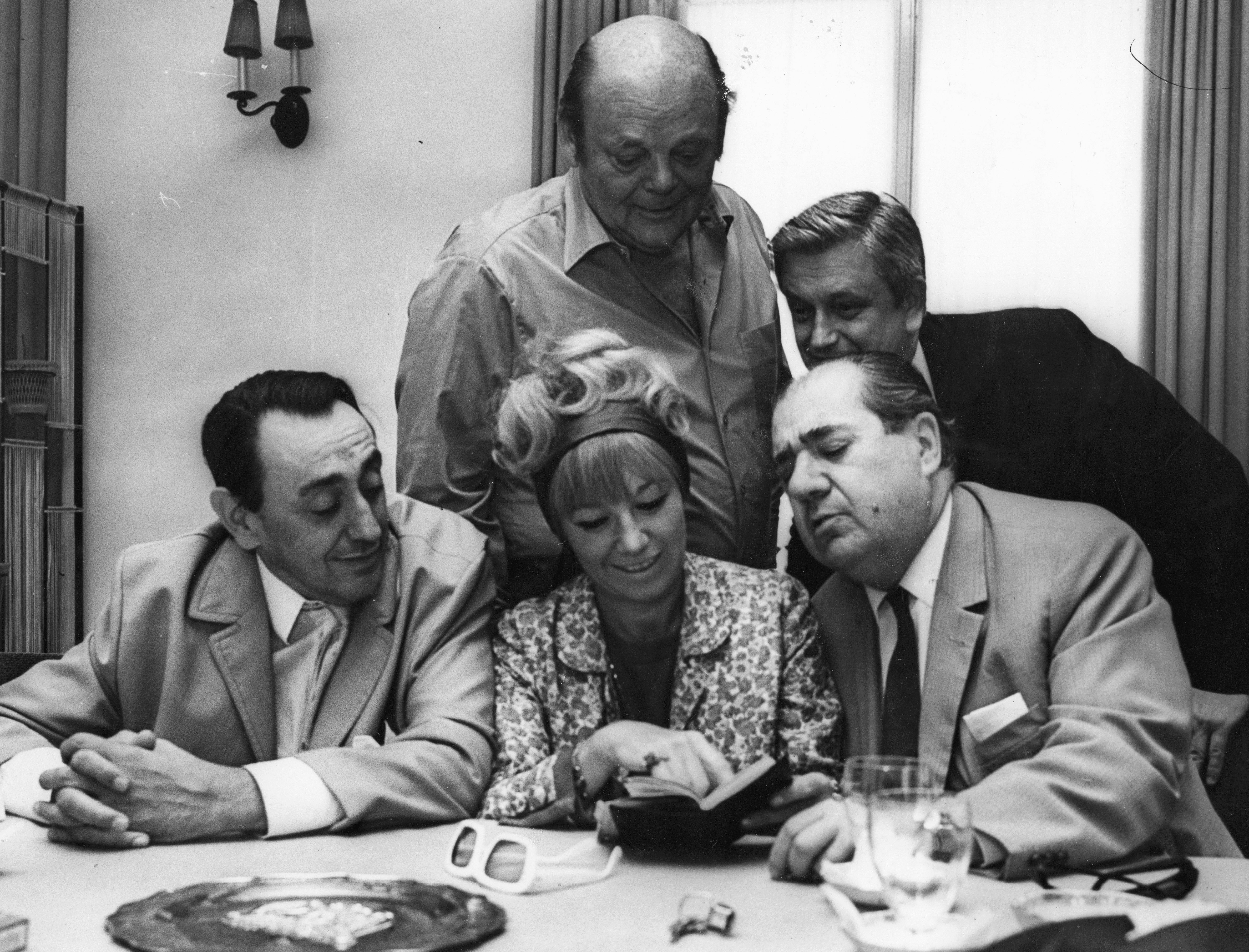 Kibédy Ervin, Géczy Dorottya és Hlatky László, mögöttük Kazal László színművészek. Location: Hungary Title: Kibédy Ervin, Géczy Dorottya és Hlatky László, mögöttük Kazal László színművészek.